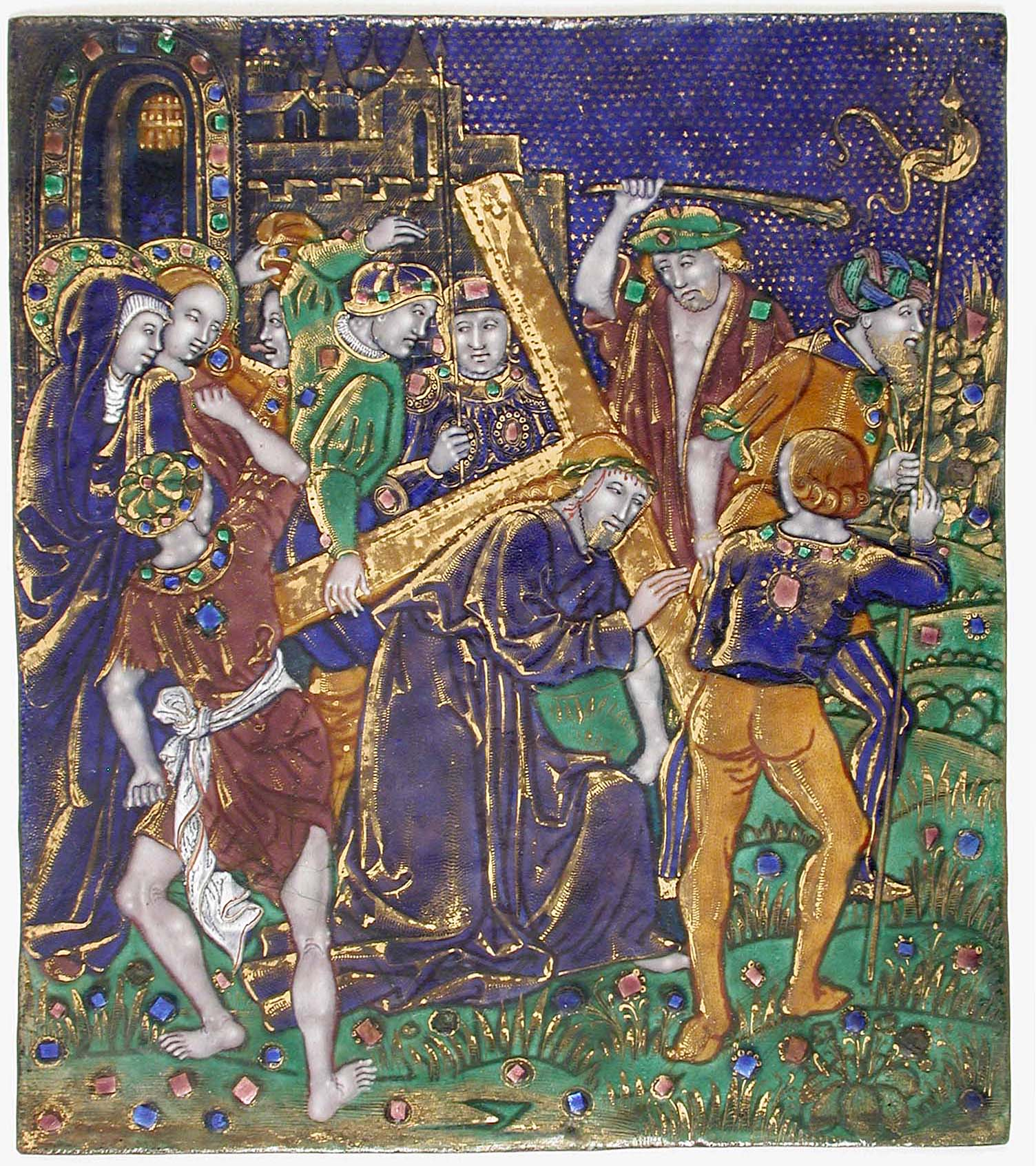 French; Plaque; Enamels-Painted